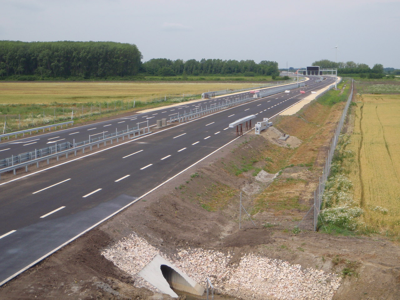 Csorna kelet csomópont